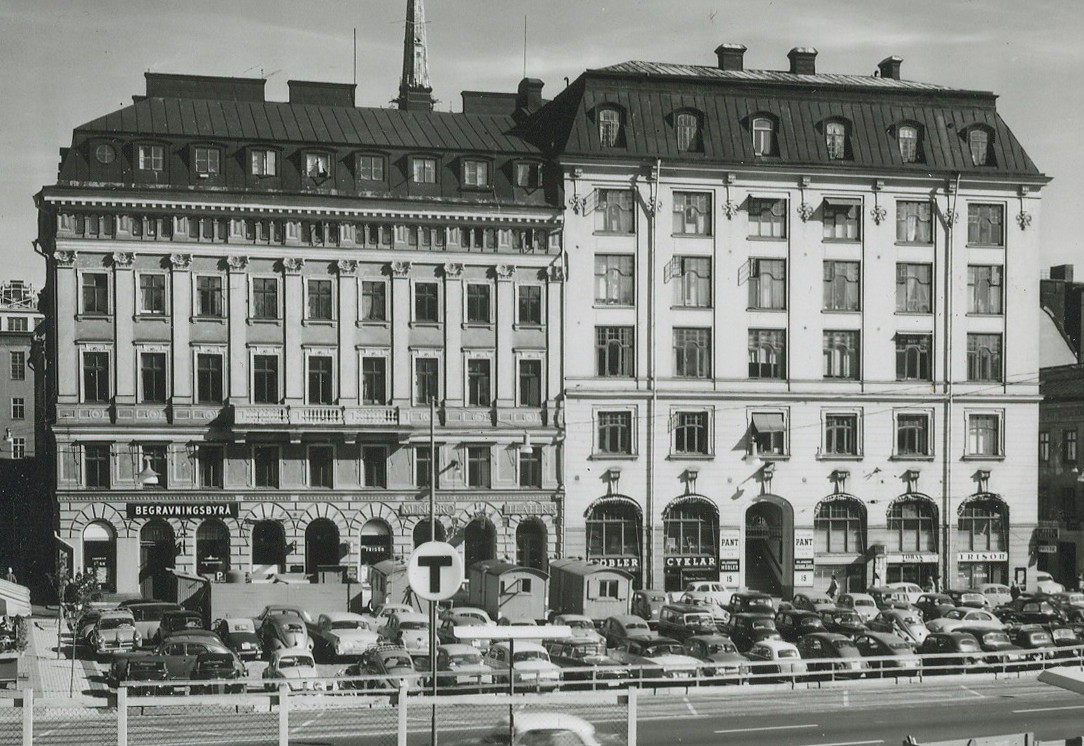 Mälartorget med kvarteret Midas